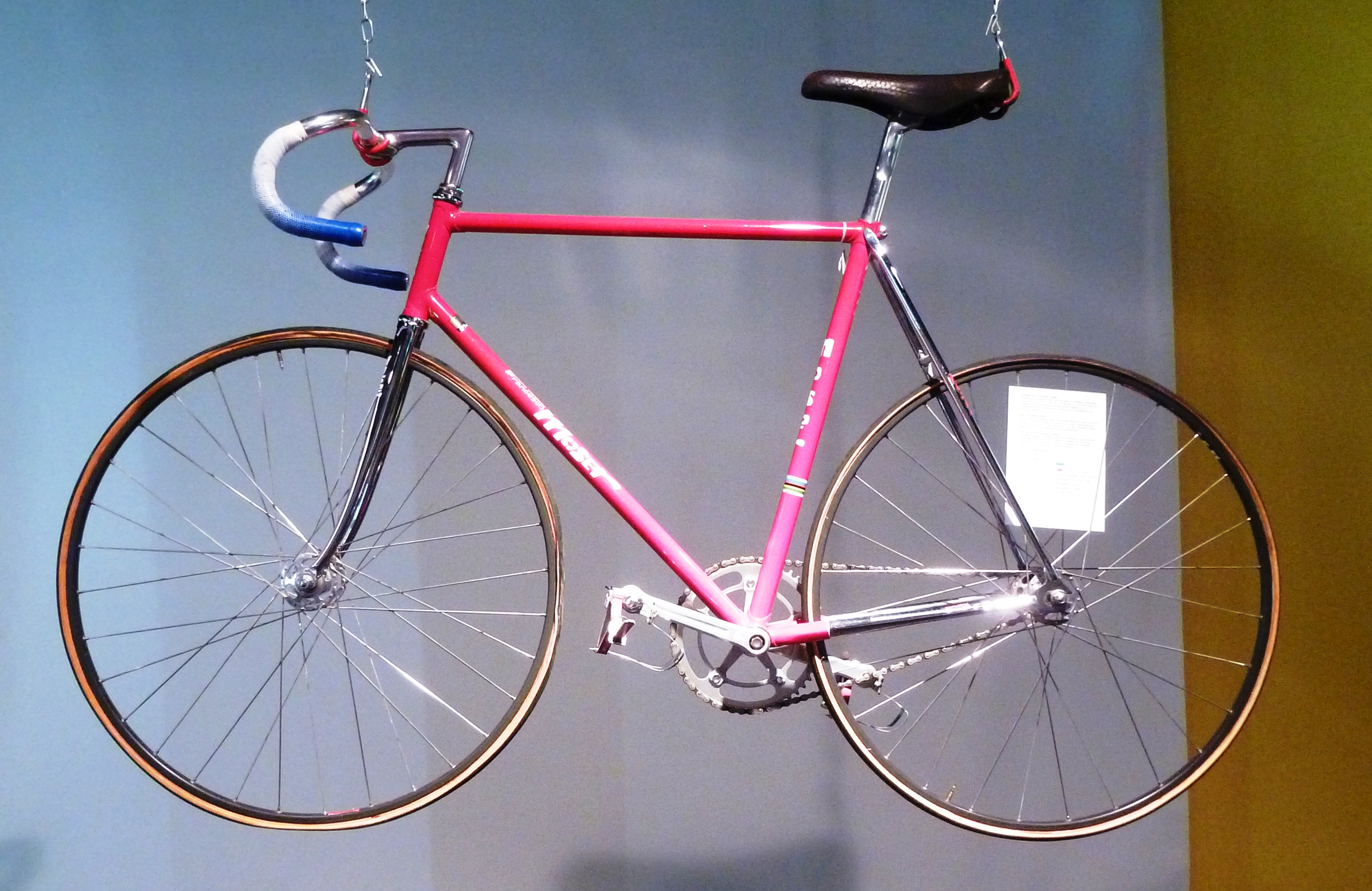 Bahnrad von Francesco Moser, 1978, im National Wielermuseum in Roeselaere, Belgien